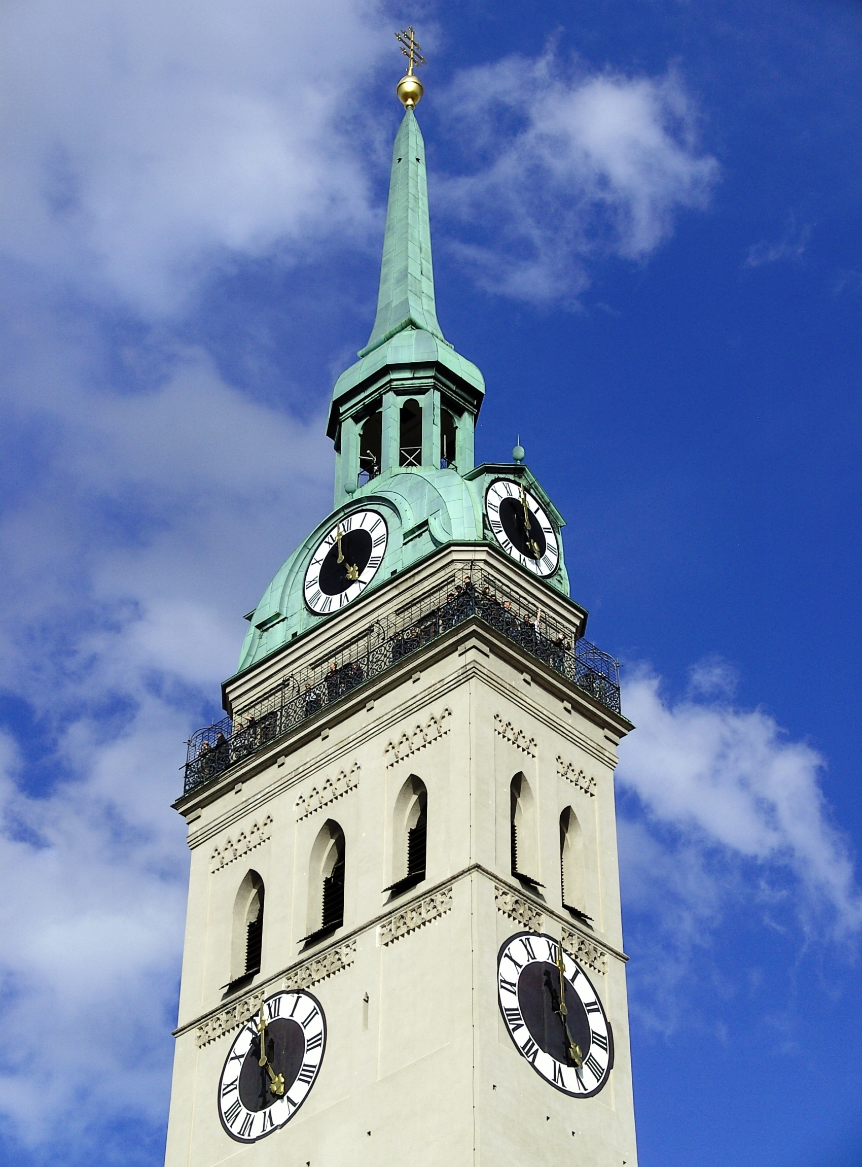 Detailaufnahme des Kirchturm des St. Peter in München.